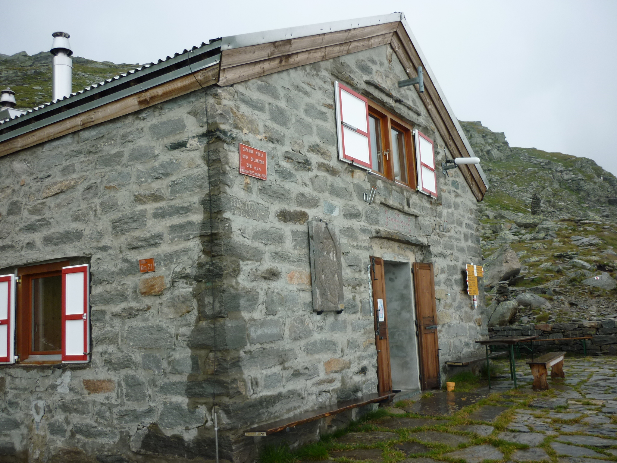 Adulahütte UTOE, Altbau von 1923, Tessin, Schweiz